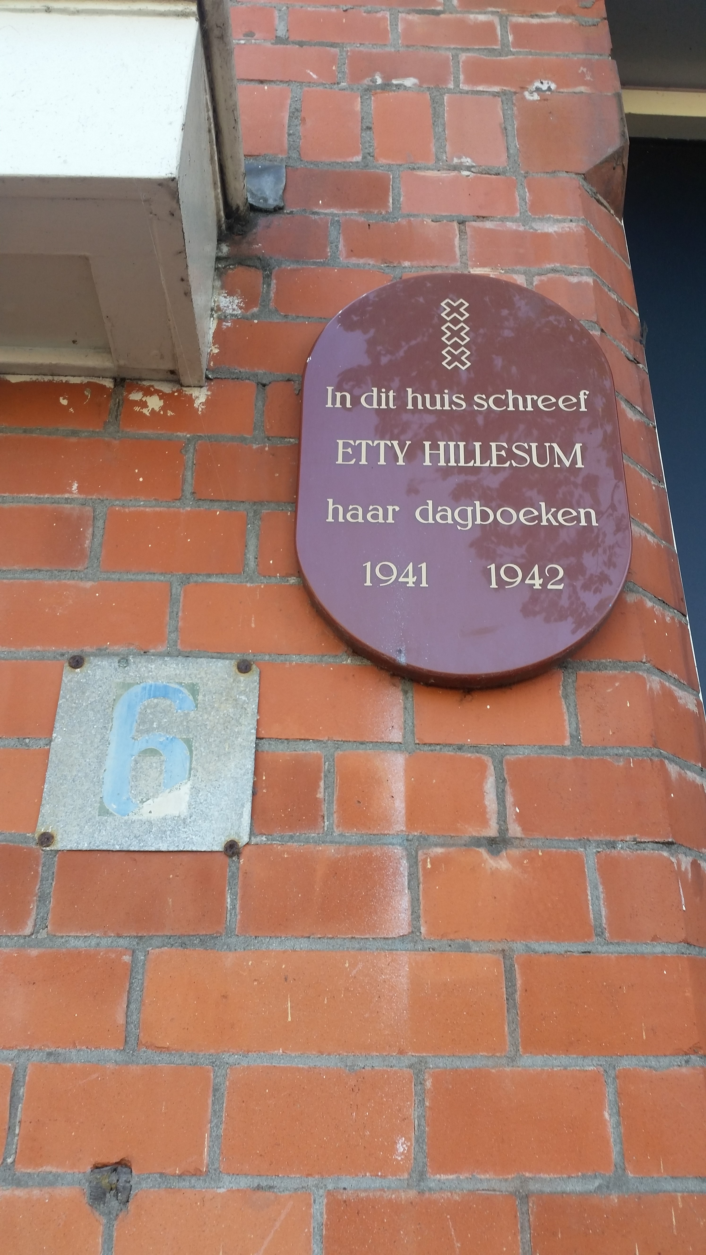 Impressie van Gabriël Metsustraat 2-6 te Amsterdam (april 2020)